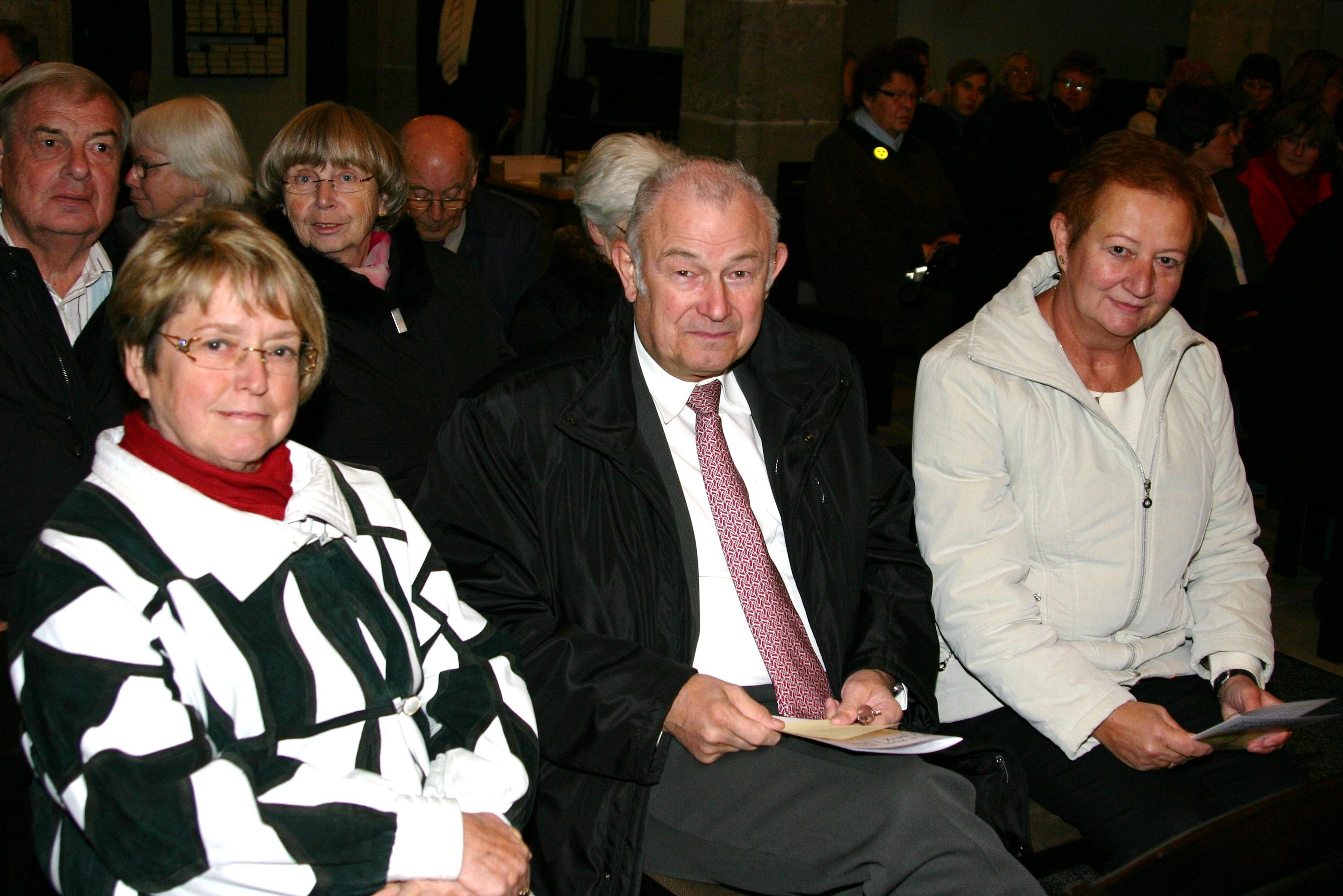 Ministerpräsident a.D. Dr. Günther Beckstein mit Gattin Marga (links) zu Besuch in St. Paul